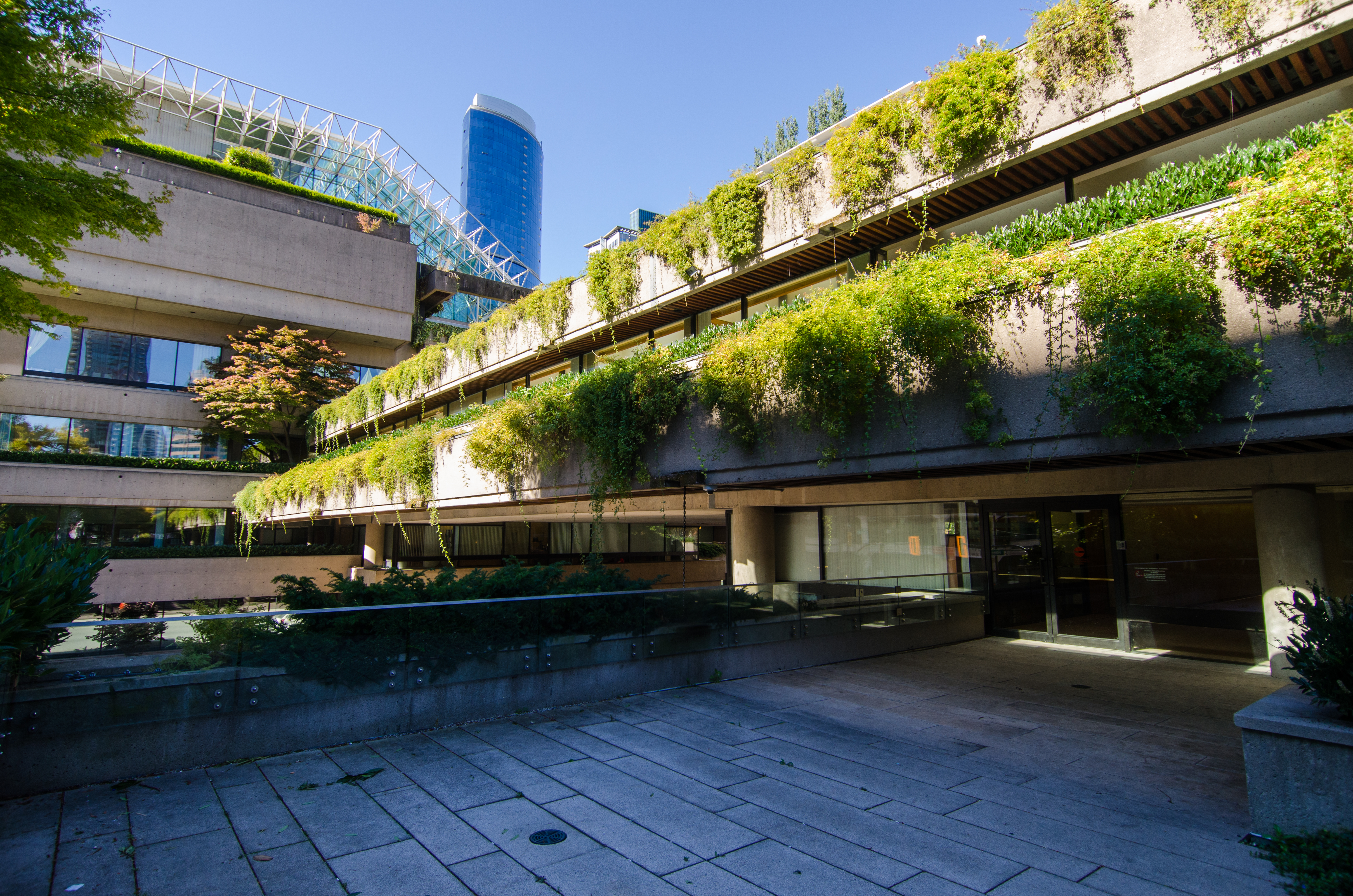 Law Courts (Vancouver)